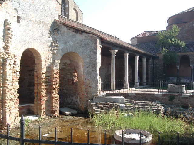 Torcello, 7. századi keresztelőkápolna maradványai